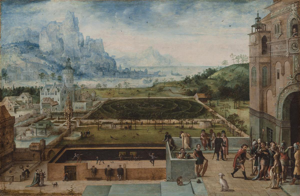 LG 1540; 45,1 x 68,6 cm